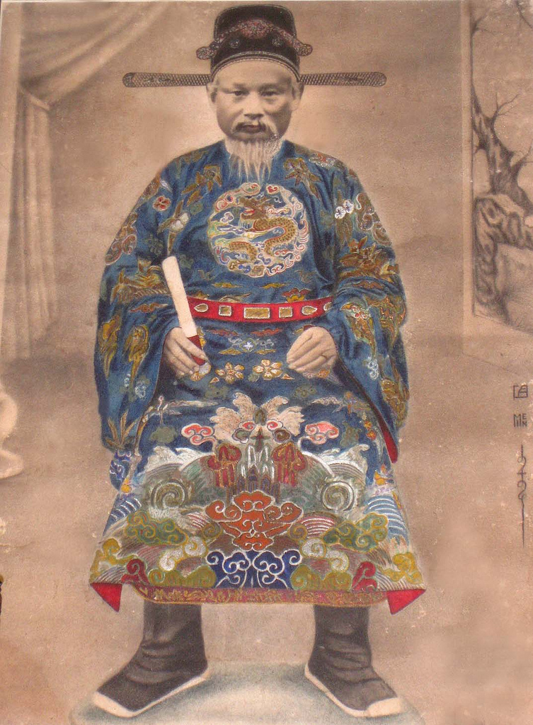 Tranh vẽ chân dung Nguyễn Chấn (1852 - 1911), tự là Từ Ngọc, quan Quyền Án sát Hưng Yên thời Nguyễn.